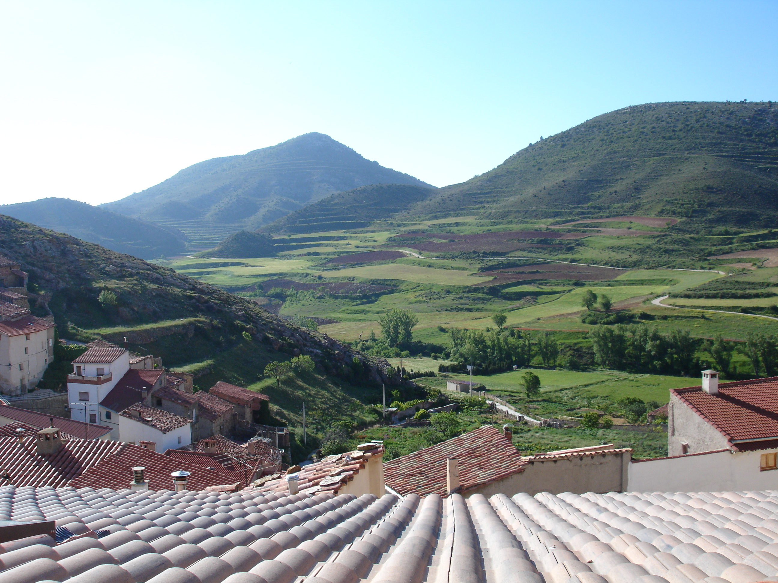 Aragonés: Exulb (Andorra-Sierra d'Arcos, Tergüel, Aragón)